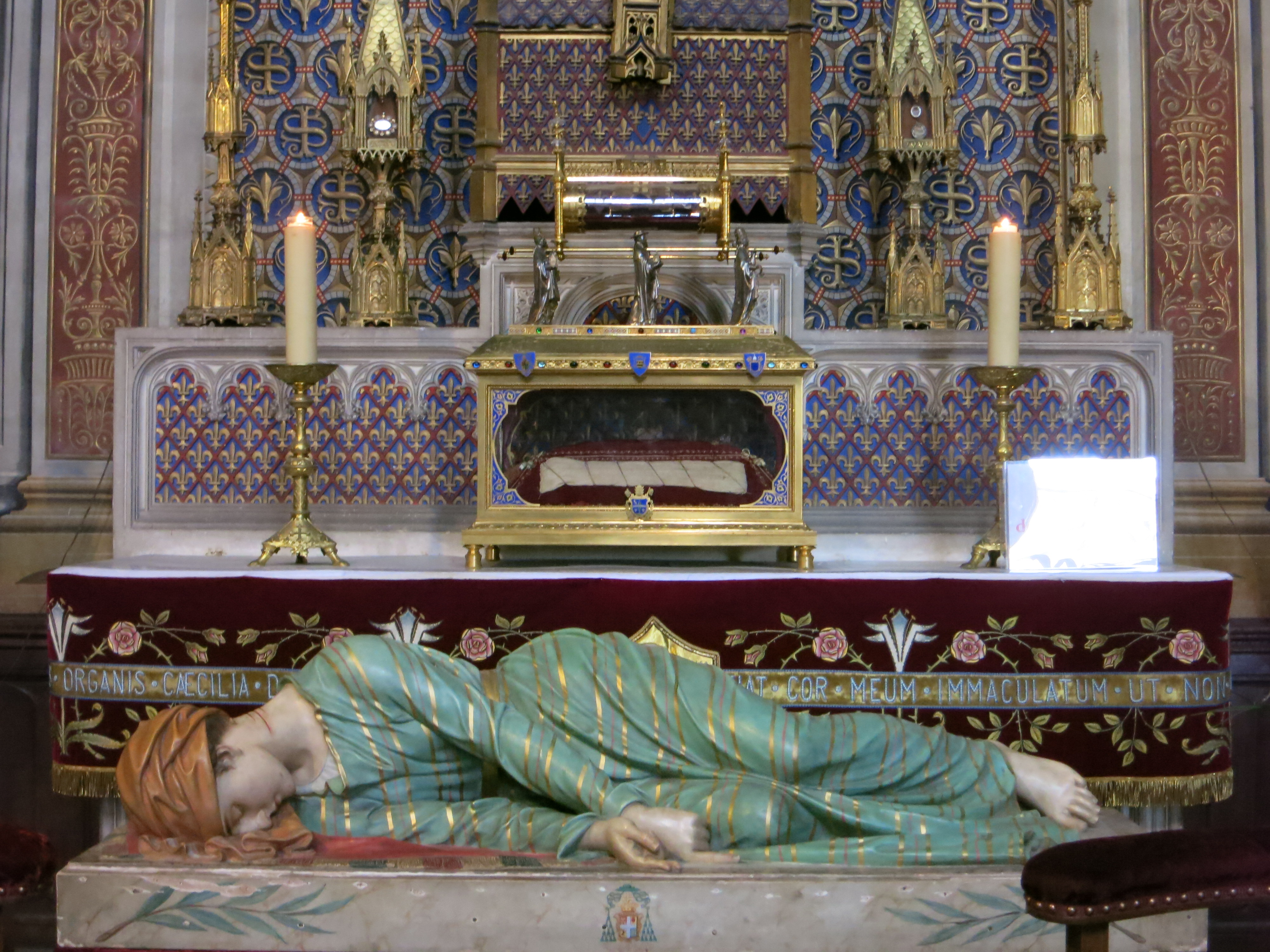 Reliques de sainte-Cécile